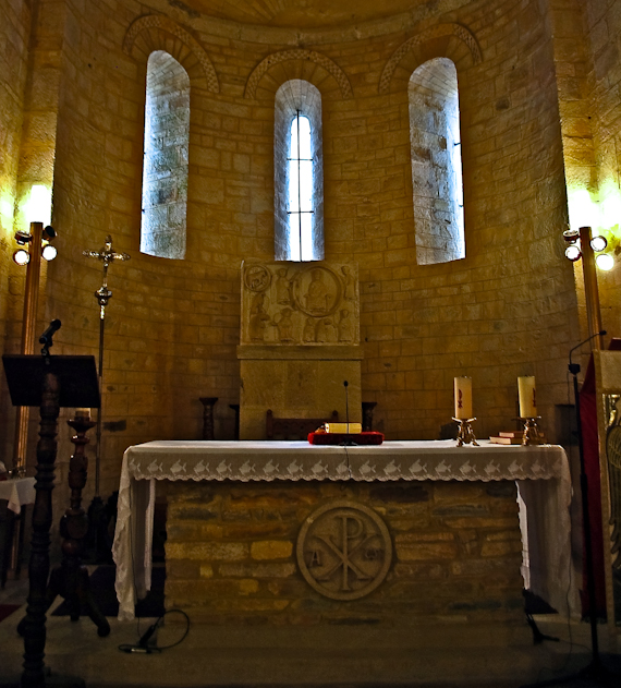 Basílica de San Martiño de Mondoñedo. Foz. Provincia de Lugo